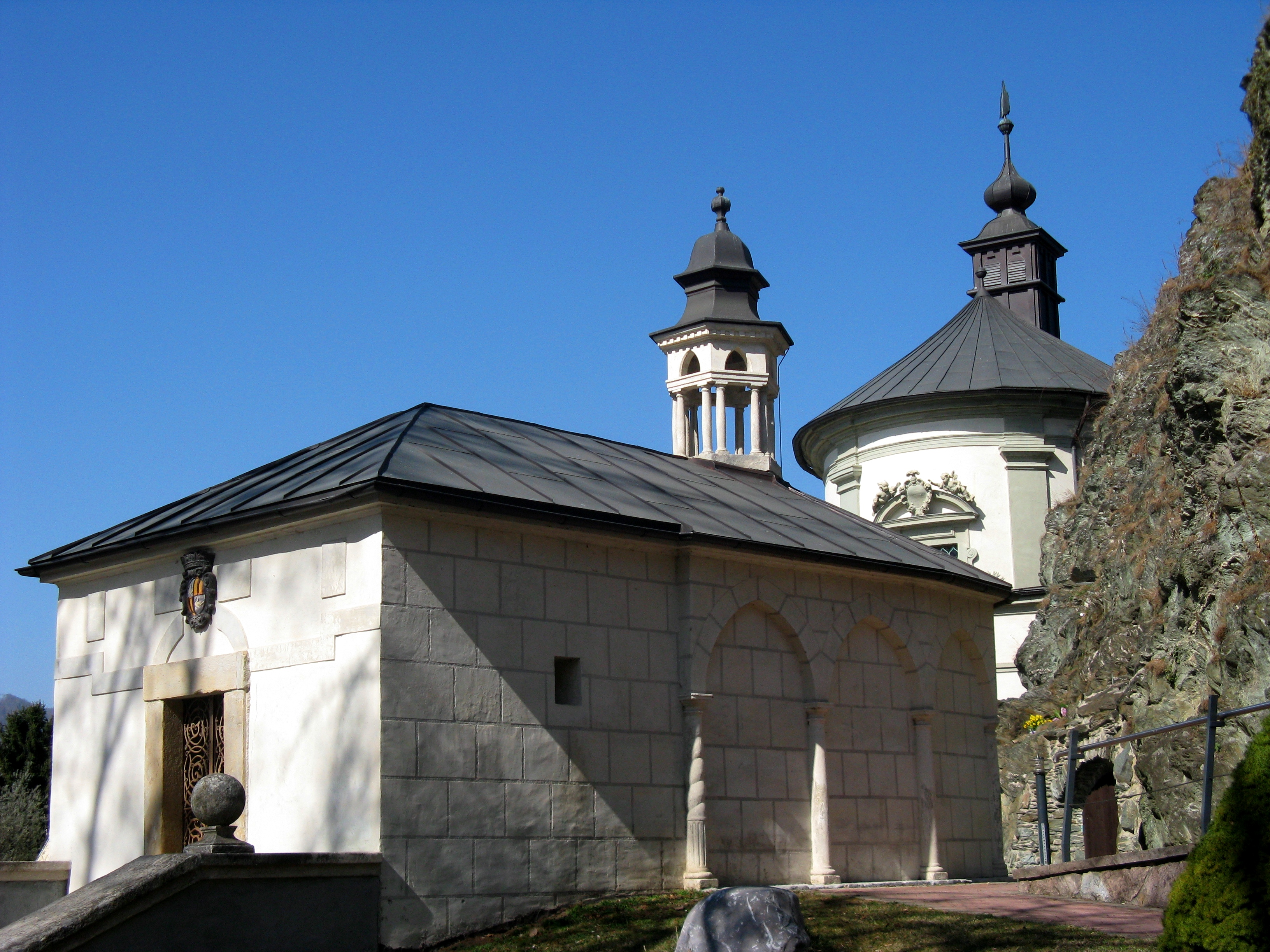 Grazer Kalvarienberg, Kapelle zum Heiligen Grab, Außenansicht mit Dismas- oder Mariatroster-Kapelle im Hintergrund